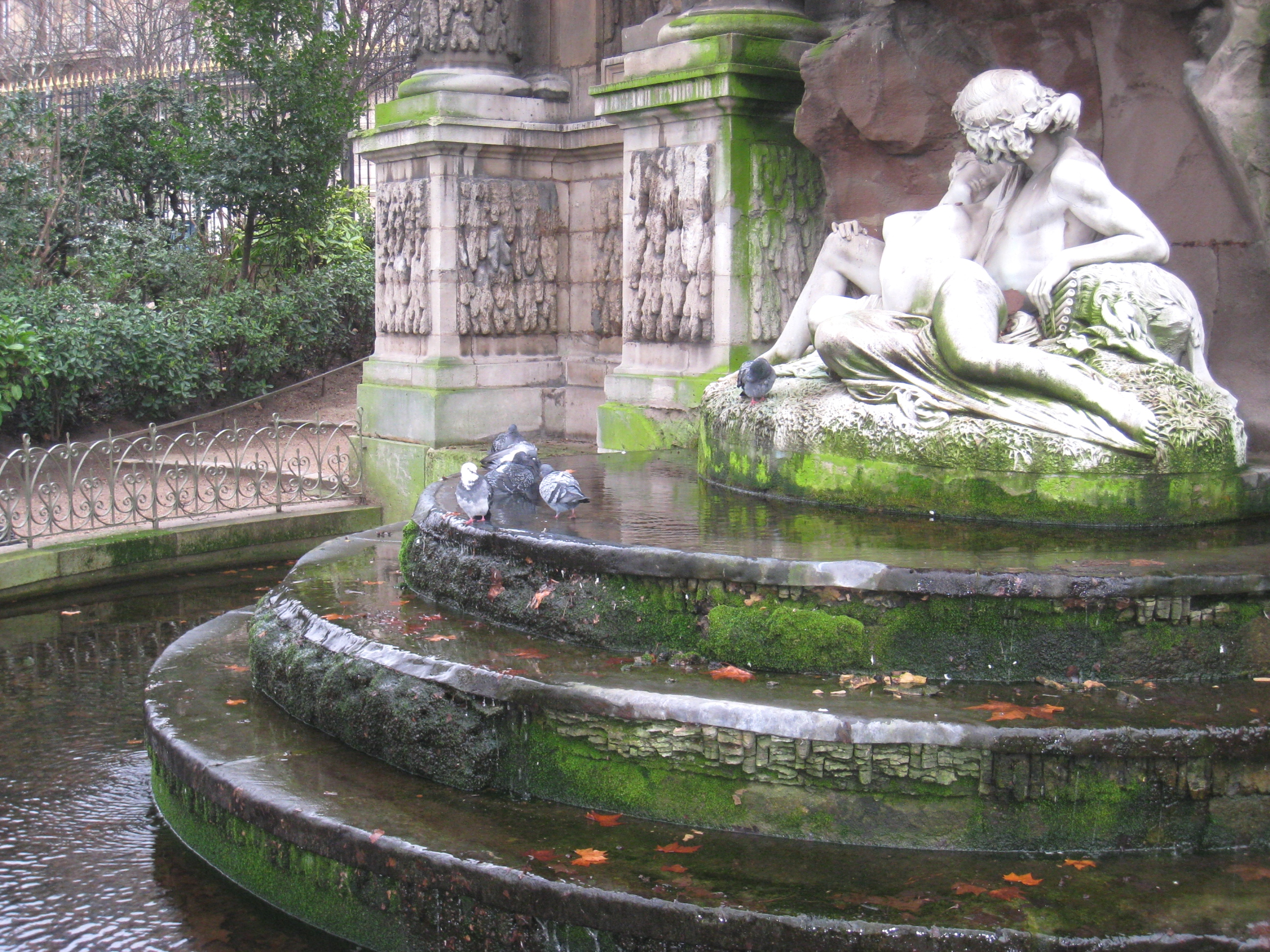 Jardin du Luxembourg, Paris, France - Medici Fountain detail.